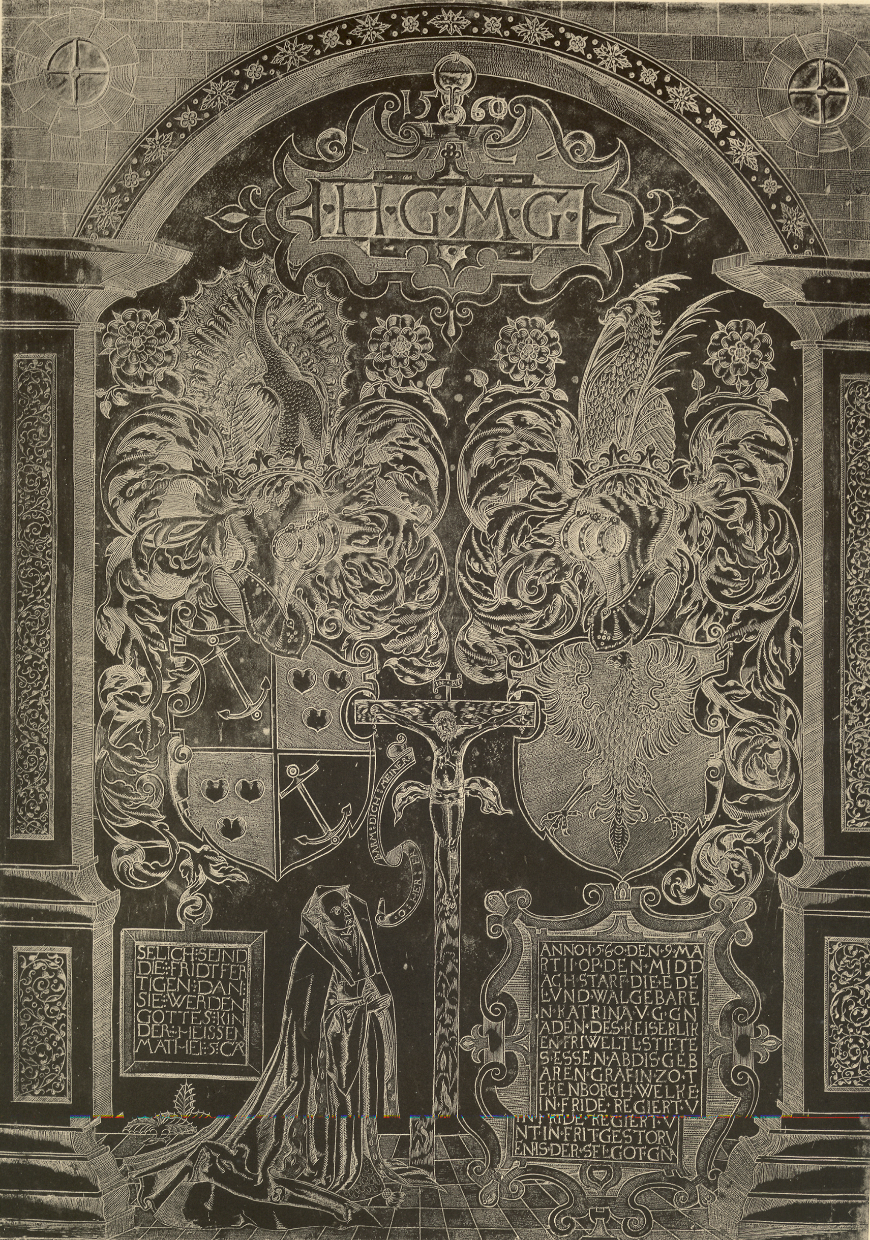 Epitaph der Essener Äbtissin Katharina von Tecklenburg (+1560), Bronze, 1947 aus der Essener Münsterkirche gestohlen